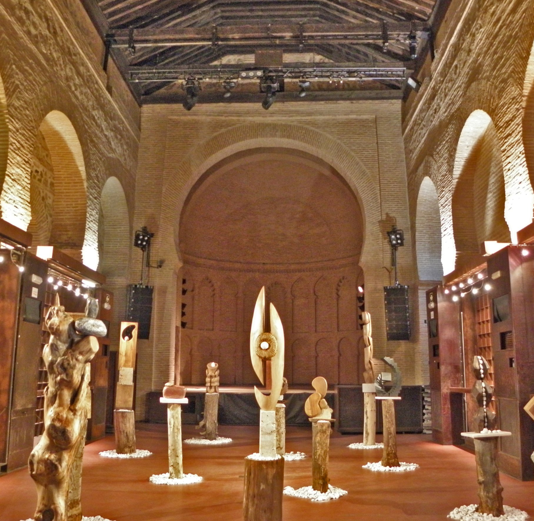 CIRCULO DE ARTE. Una antigua iglesia mudéjar convertida en espacio cultural y de ocio. Así es el Círculo de Arte de Toledo, ubicado en la Iglesia de San Vicente, en la que se celebran exposiciones, conciertos, actividades culturales de todo tipo e incluso, los fines de semana por las noches se convierte en una de las discotecas con más ambiente de la ciudad.